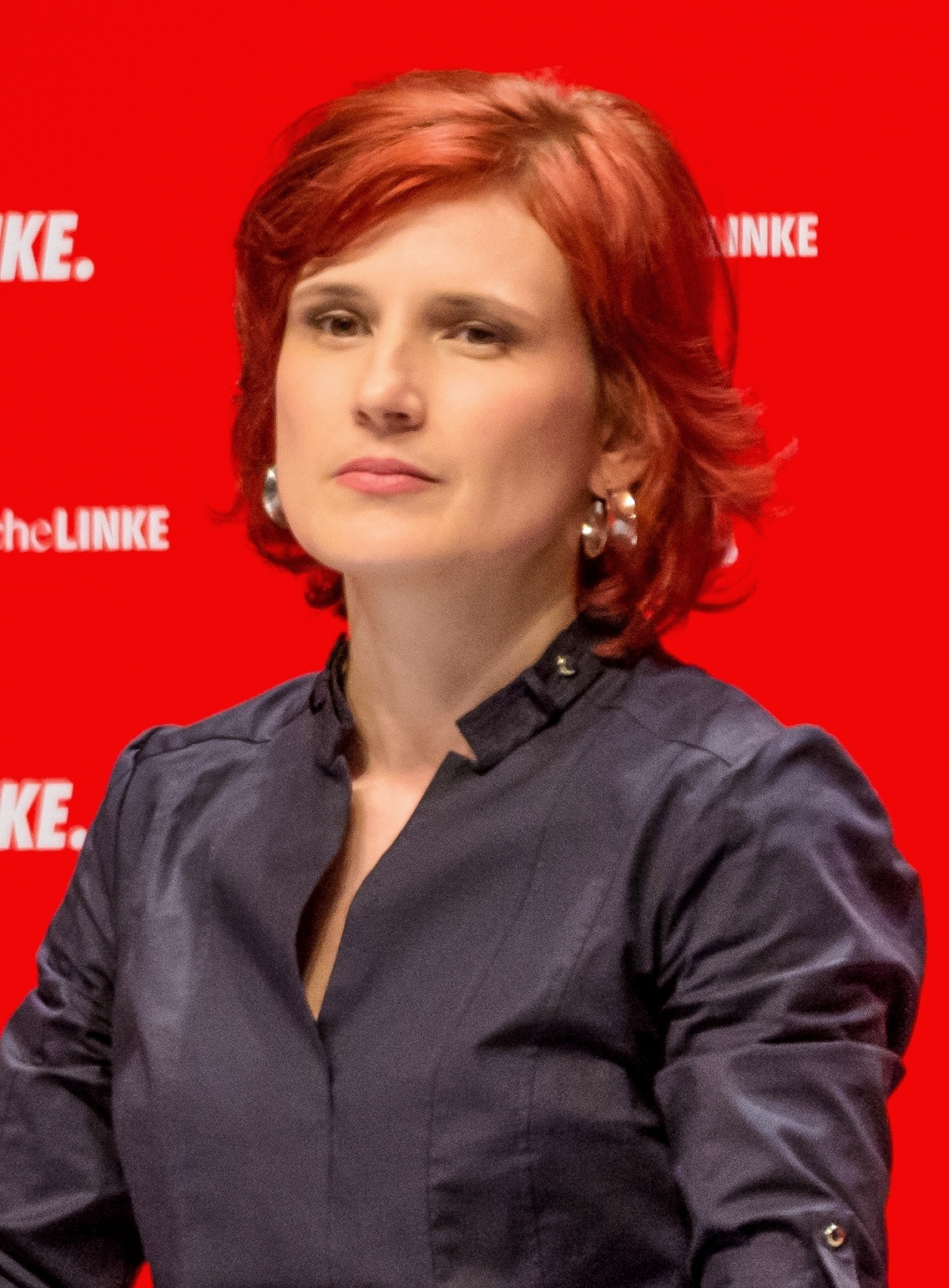 Katja Kipping